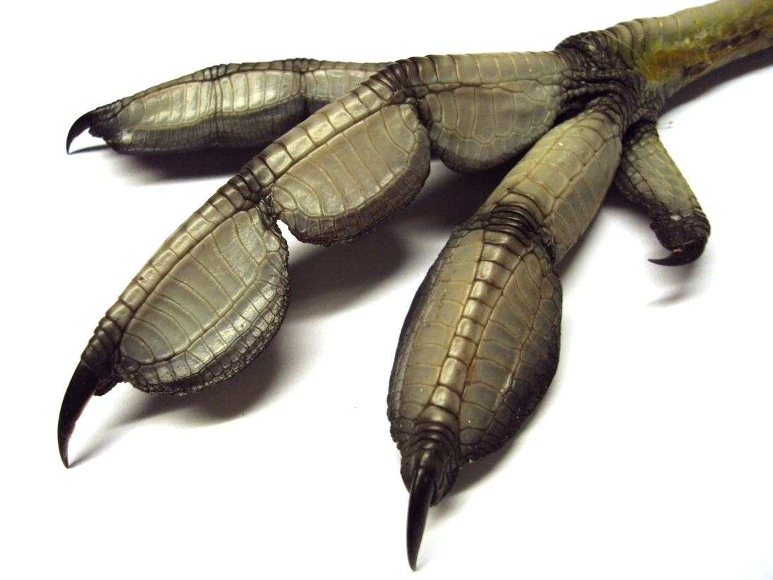 Blässhuhnfuß: Schwimmlappen statt Schwimmhaut